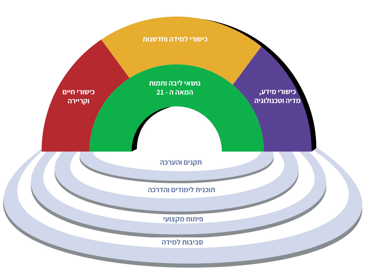 מודל p21 framework for 21st century learning מתורגם